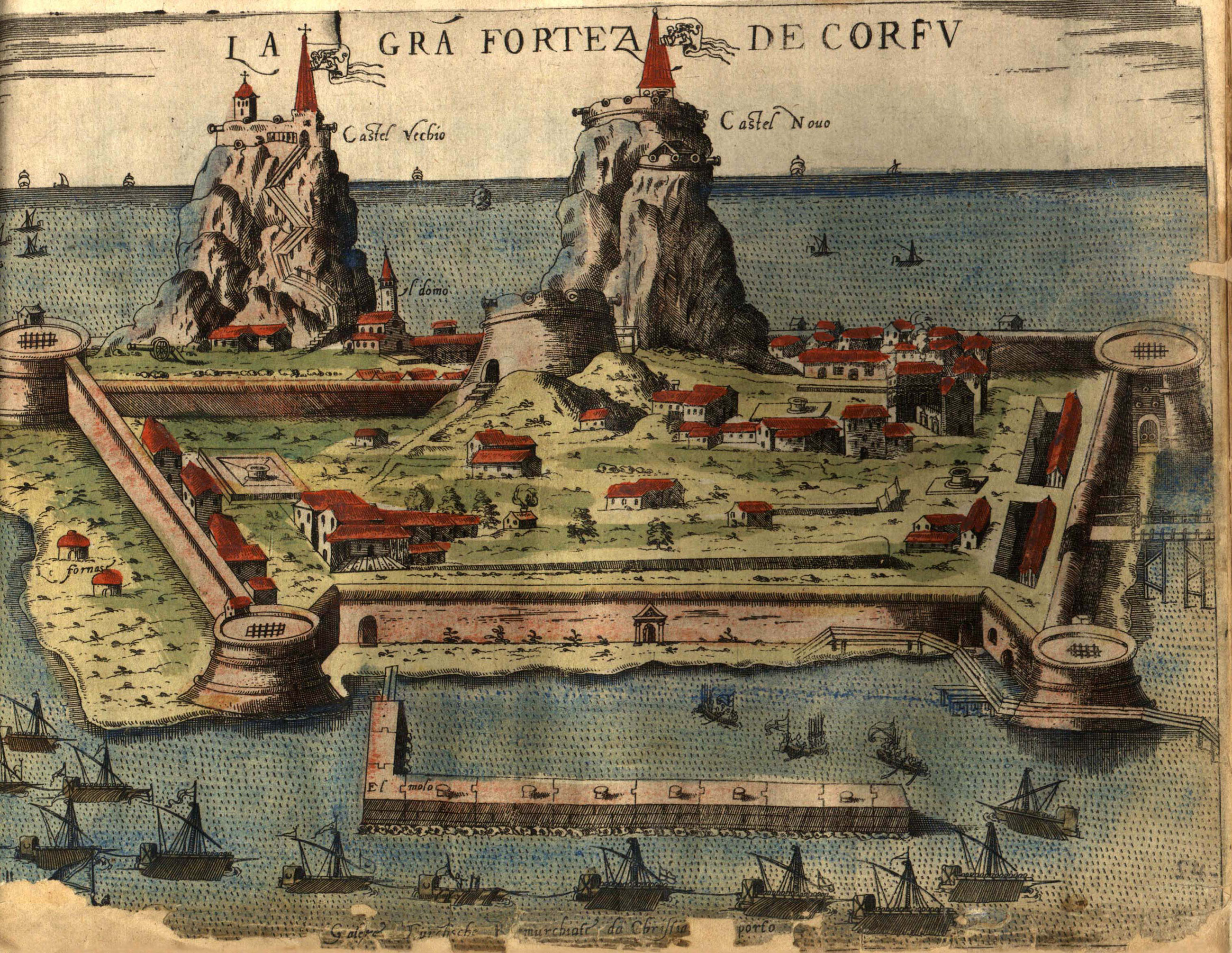 Παλιό Φρούριο Κέρκυρας